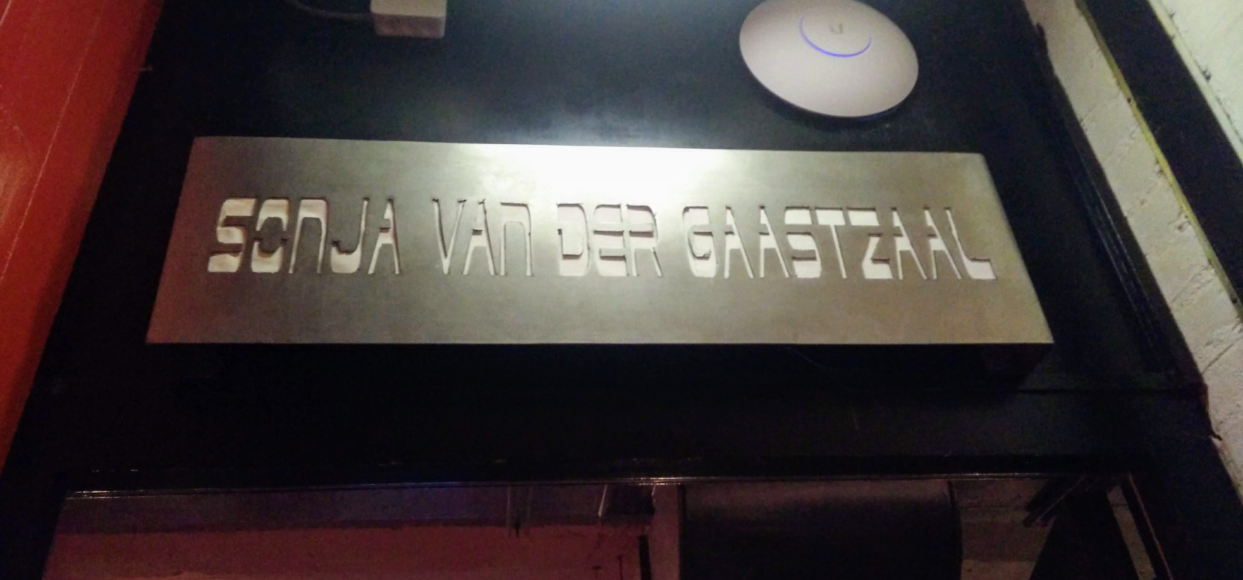 Bord voor Sonja van der Gaast zaal in de Kargadoor (Utrecht)